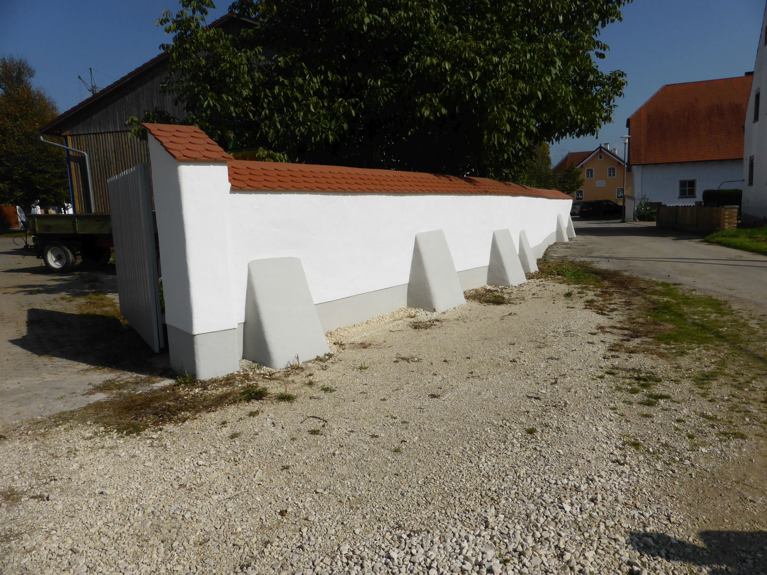 Schloss Holzheim am Forst - Mauer